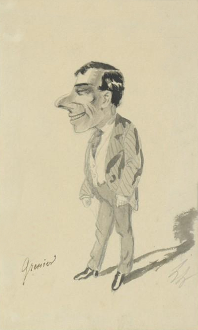 Pierre Grenier : portrait